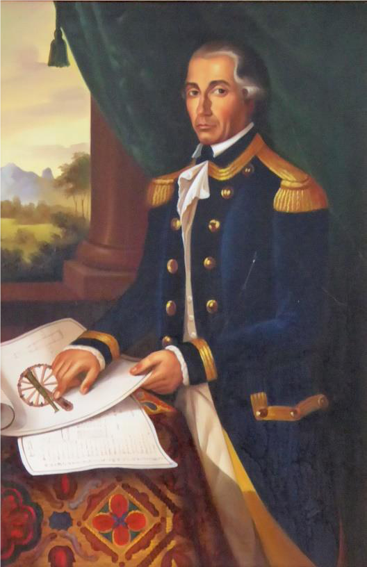 Charles-François de Buttet (1738-1797), officier, ingénieur, savant. Portrait représentant Charles-François de Buttet, officier d'artillerie du roi de Sardaigne, présentant le schéma d'un canon-obusier de montagne qui servira au montage d'un prototype, sous sa direction. [1], [2]